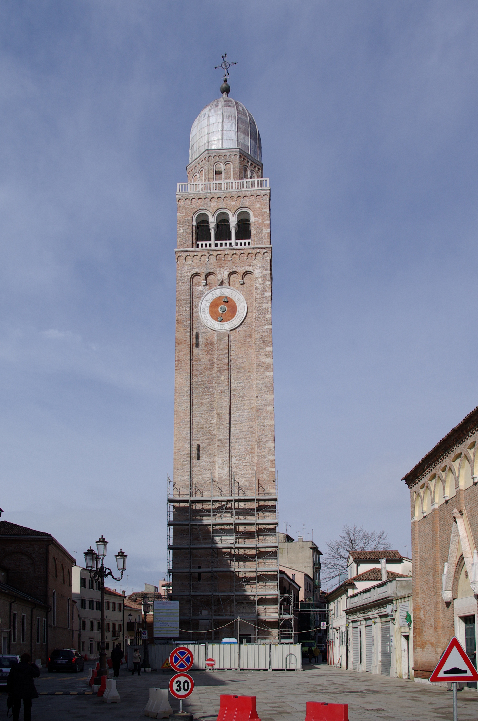 Chioggia, Cattedrale di Santa Maria Assunta